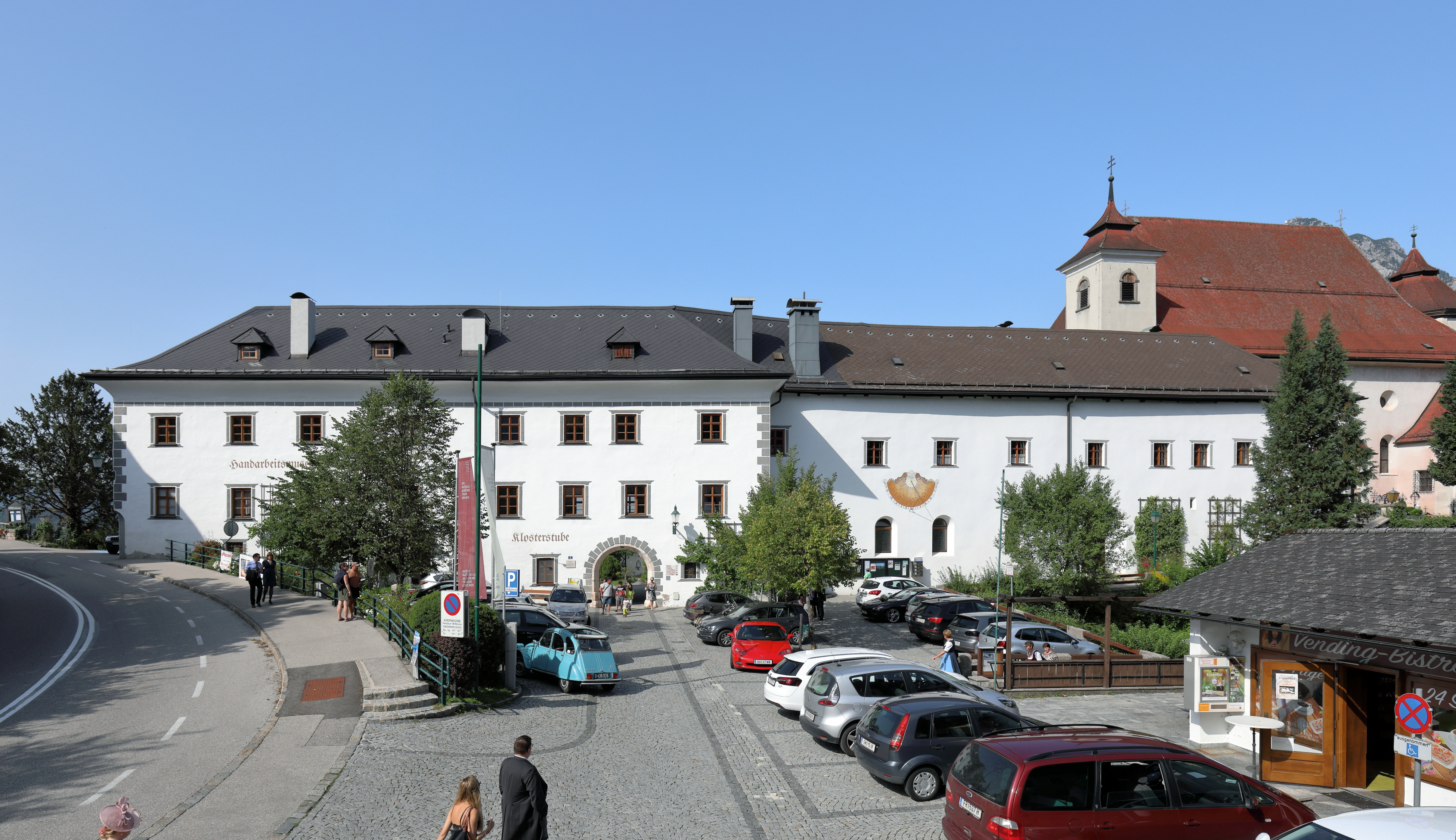 Südansicht des ehemaligen Jesuitenklosters Traunkirchen in der oberösterreichischen Gemeinde Traunkirchen. Das Kloster wurde nach einem Brand 1632 unter teilweiser Verwendung erhalten gebliebenen gotischen Teilen neu aufgebaut. 1773 erfolgte die Aufhebung des Klosters.